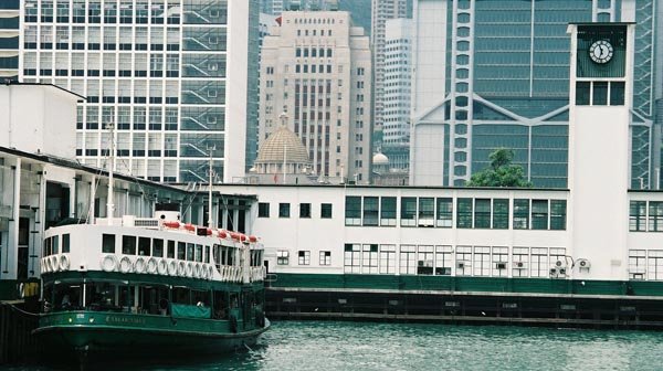 zh: 香港天星小輪 這首小輪停泊在中環天星碼頭。 由石攝 日期..(不詳, 大概在2003年)